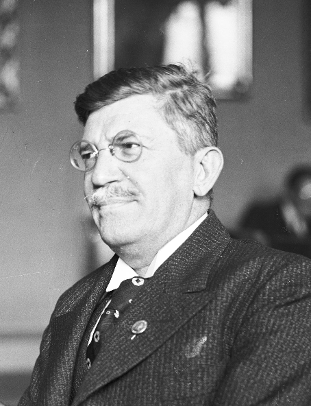 Портретна фотография на Александар Белич, сръбски и югославски езиковед